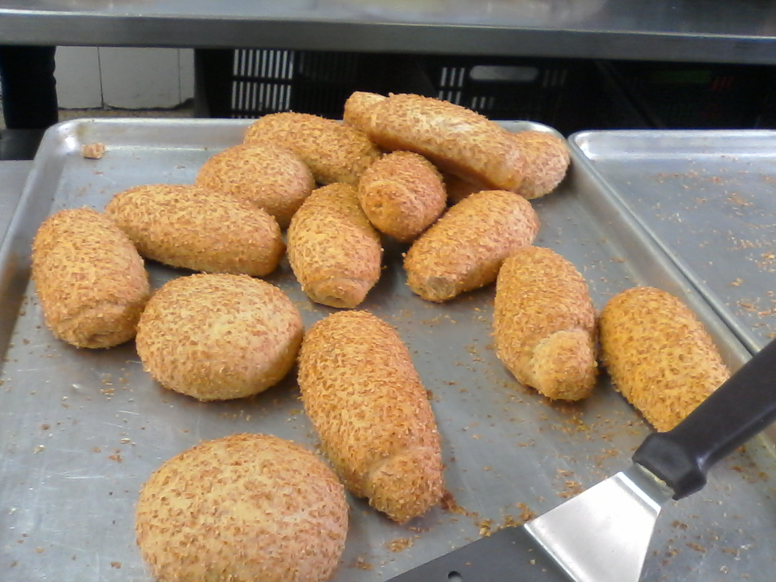 foto de los Proyectos Pedagógicos Ocupacionales de Panadería PPO del Colegio Bolivia I.E.D Bogotá Colombia